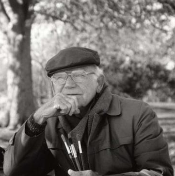 Fotografía del artista venezolano Luis Alvarez de Lugo en el 2003